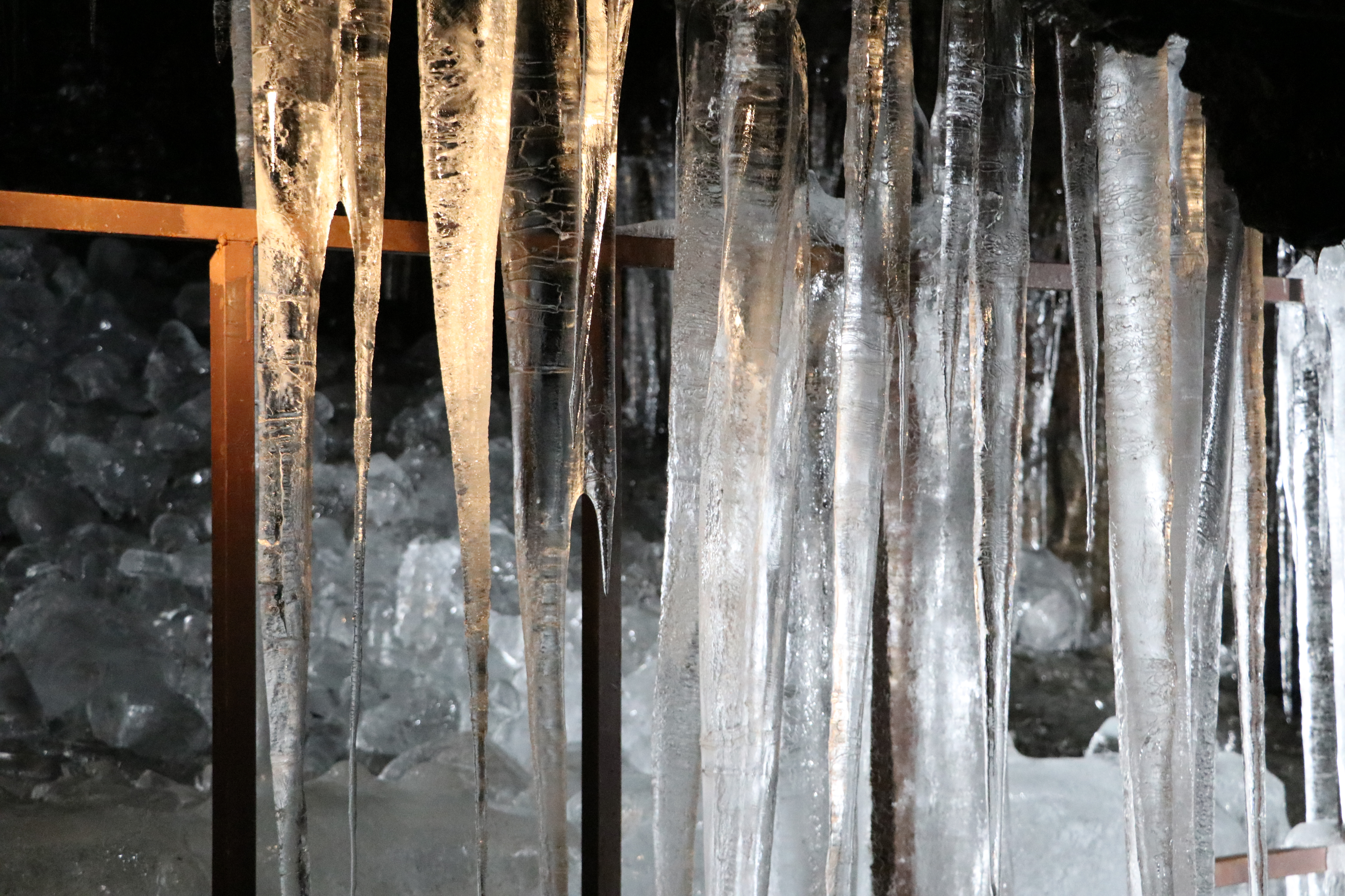 山梨県鳴沢村内にある鳴沢氷穴内の氷柱